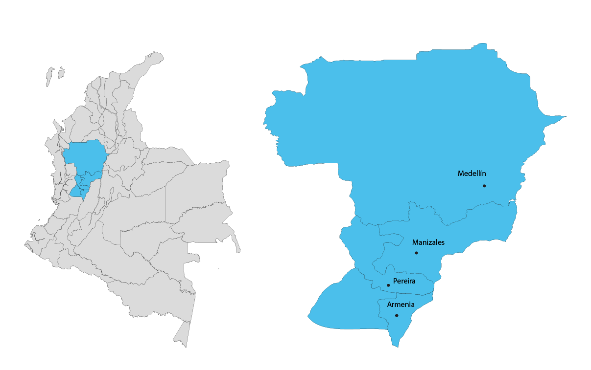 Eje musical Andino Nor-occidental